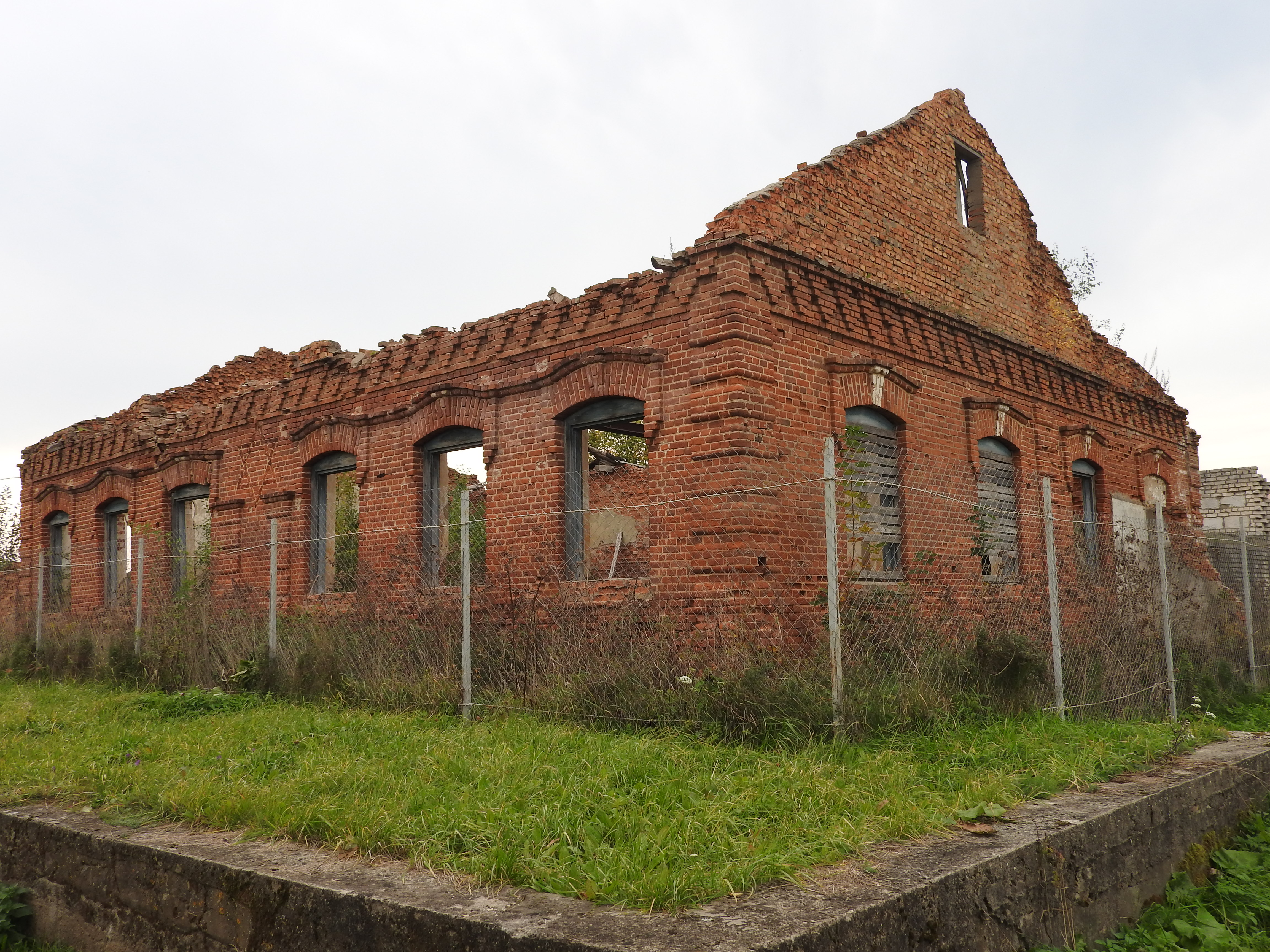 Ehemalige Synagoge in Kreva, Weißrussland